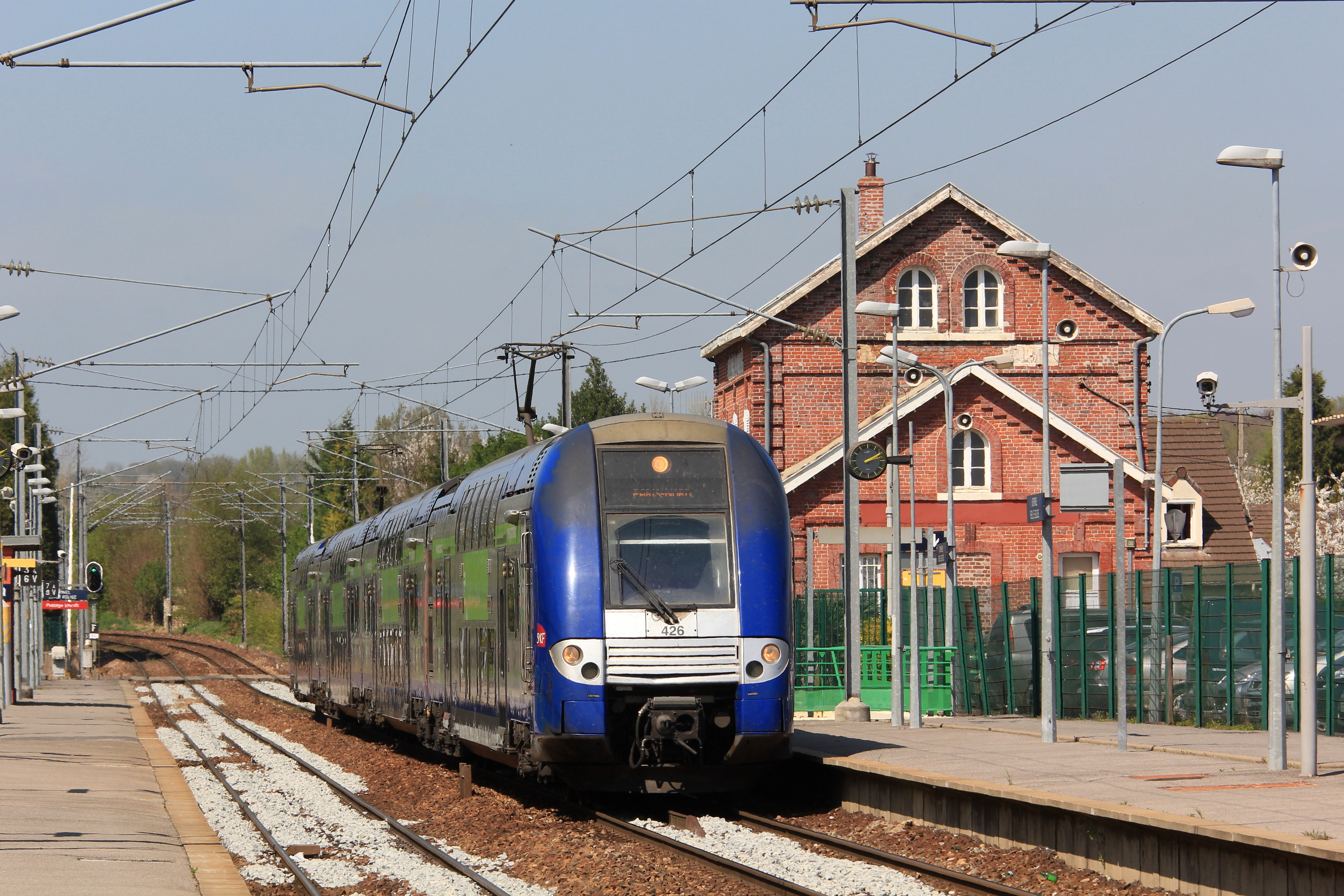 La rame TER2NNG n°426 au_TER47432_(Beauvais - Paris) desservant la gare de Bornel - Belle-Église.